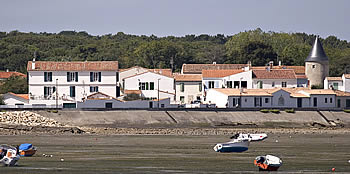 Front de mer, à gauche le Moulin, à droite la tour d'Hastrel - Rivedoux-Plage - île de Ré - France Photo issue de ma banque d'images personnelle Alain Pep.per